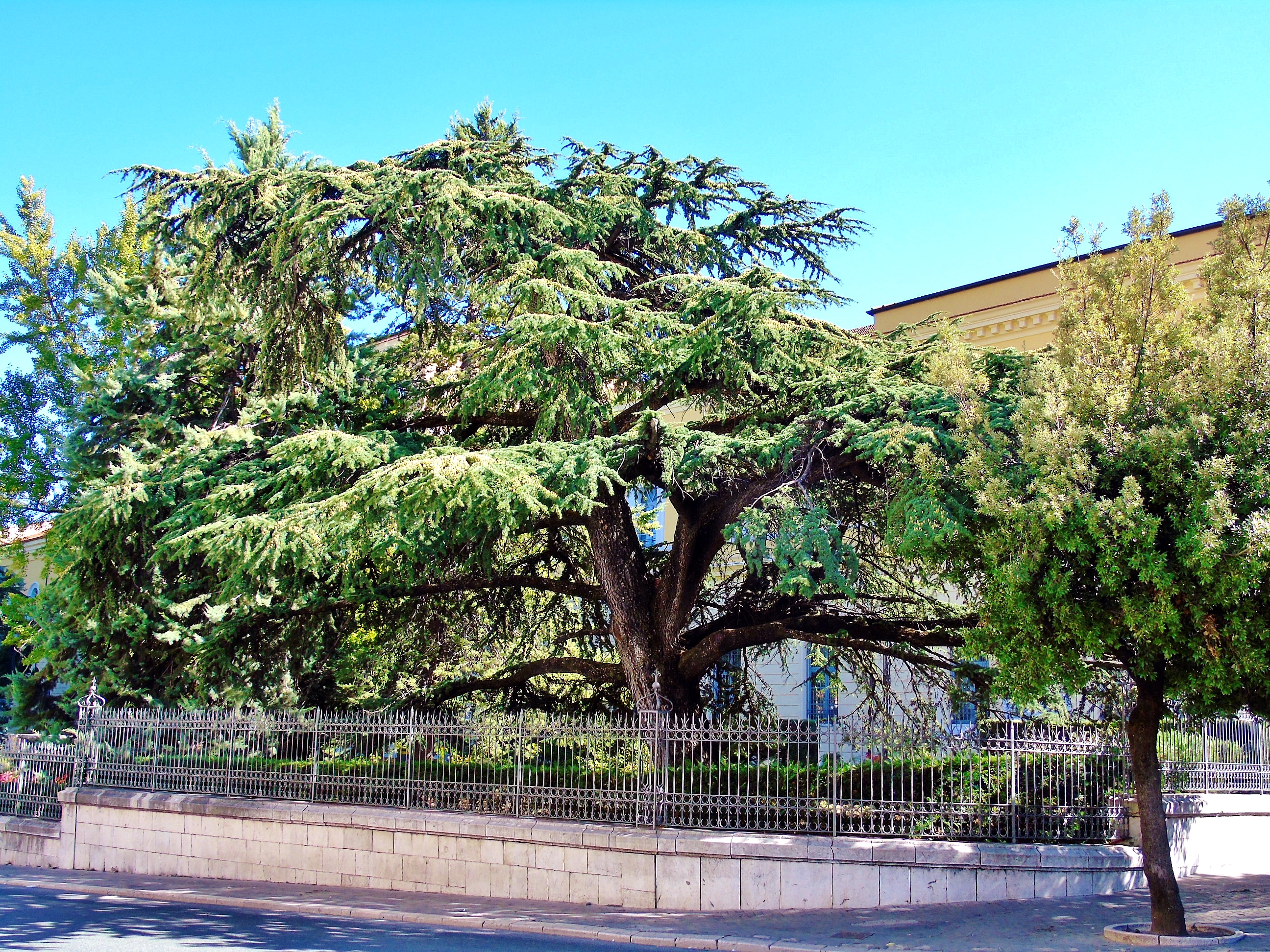 cedro del Libano presente nel parco del Convitto Mario Pagano di Campobasso This is a photo of a monument which is part of cultural heritage of Italy.